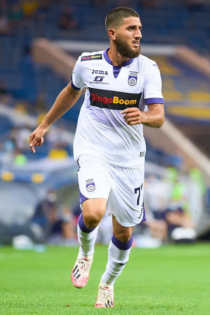 «Уфа» показала характер, добыв волевую победу над «Ростовом»